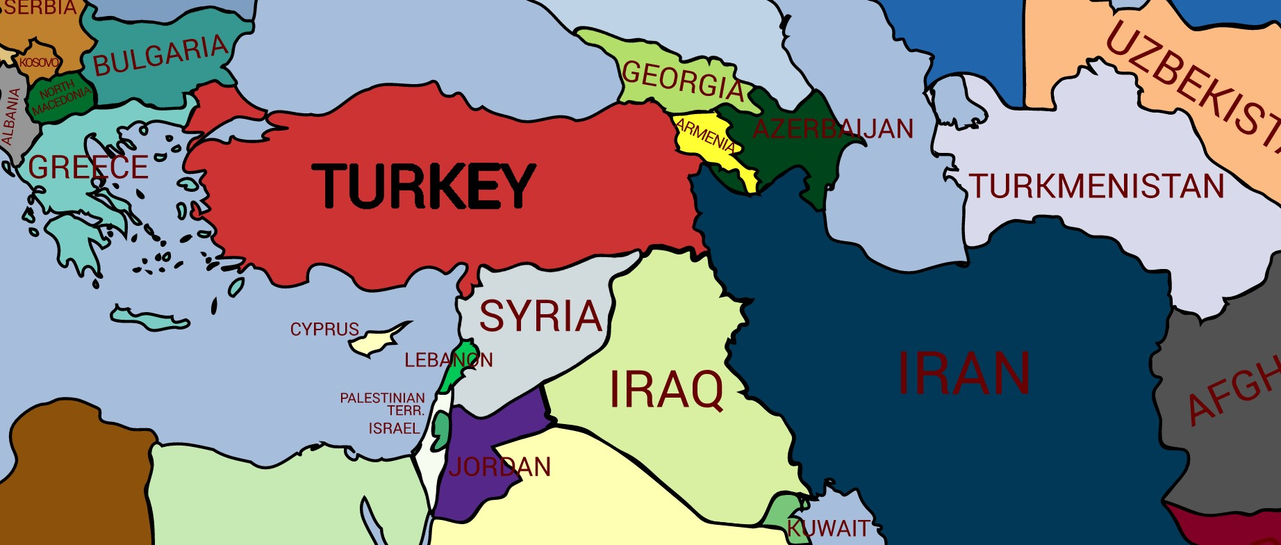 map of Turkey